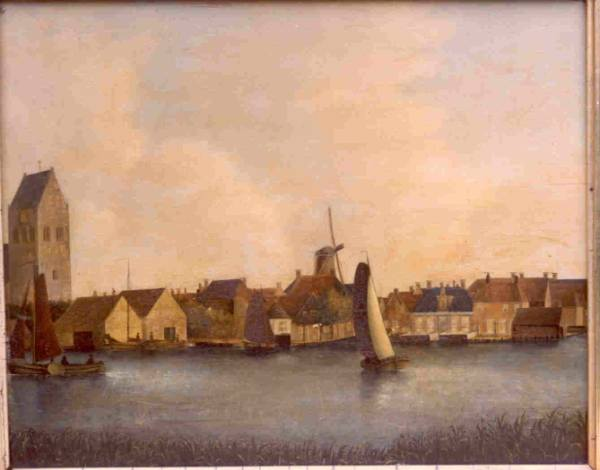 Oud schilderij van de Nieuwe Kade in Grou, rond het jaar 1850